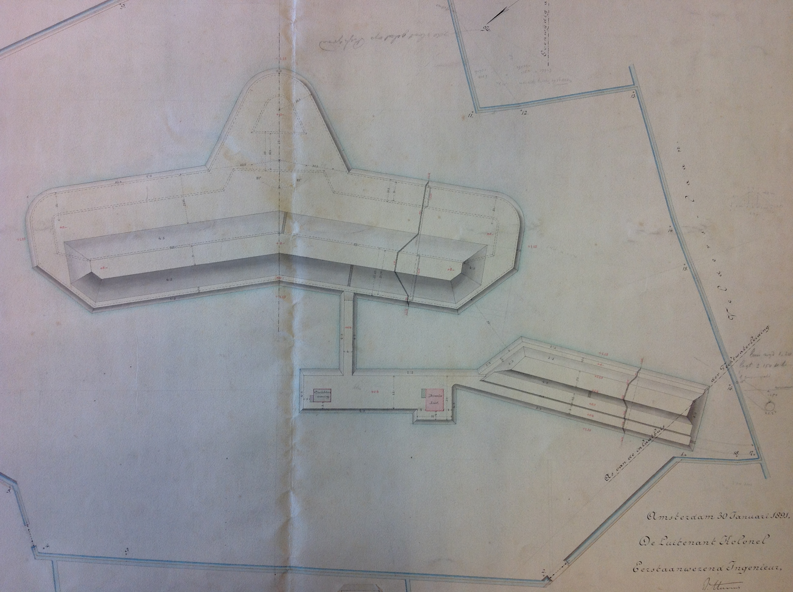 Fragment van de tekening met plan voor de zandophoging bij het Fort Nigtevecht (1891). Origineel gezien in Het Utrechts Archief. Titel op blad: Fort bij Nigtevecht Zandophogingen voor het Fort bij Nigtevecht Ondertekend met: Amsterdam 30 januari 1891 De Luitenant Kolonel Eerstaanwezend ingenieur Handtekening onleesbaar De 2e Luitenant Ingenieur Handtekening onleesbaar